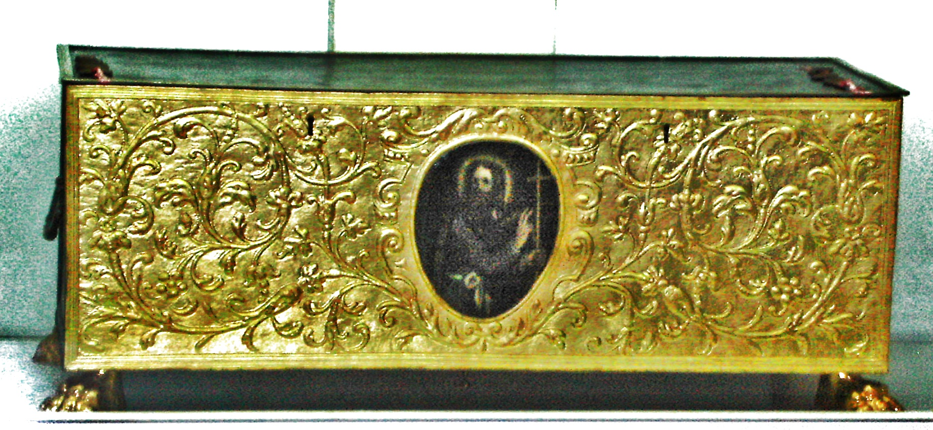 Reliquiar St. Thomas, Dom, Ortona